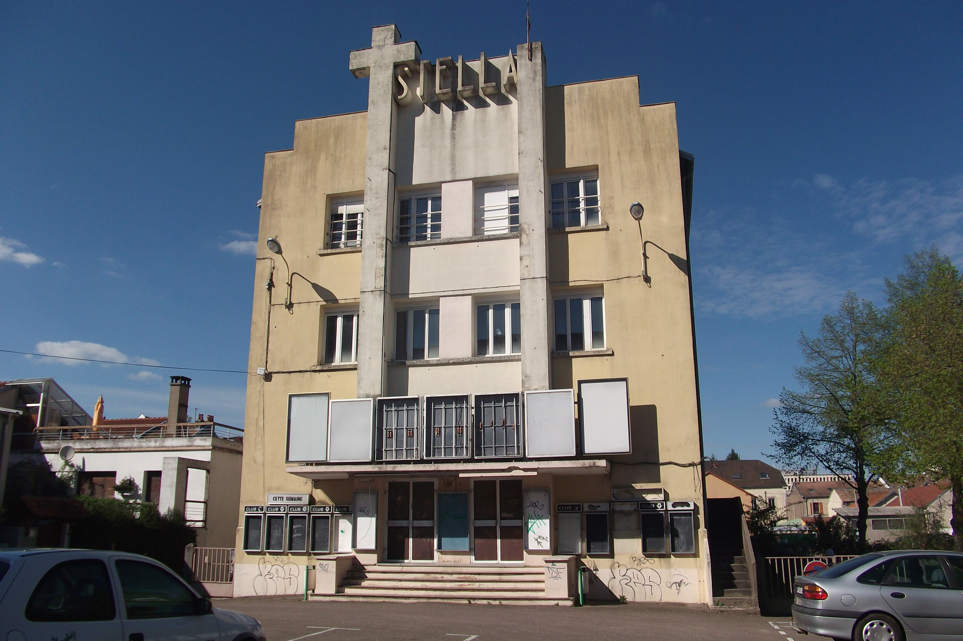 L'ancien cinéma Stella de Vesoul (Haute-Saône, Franche-Comté)